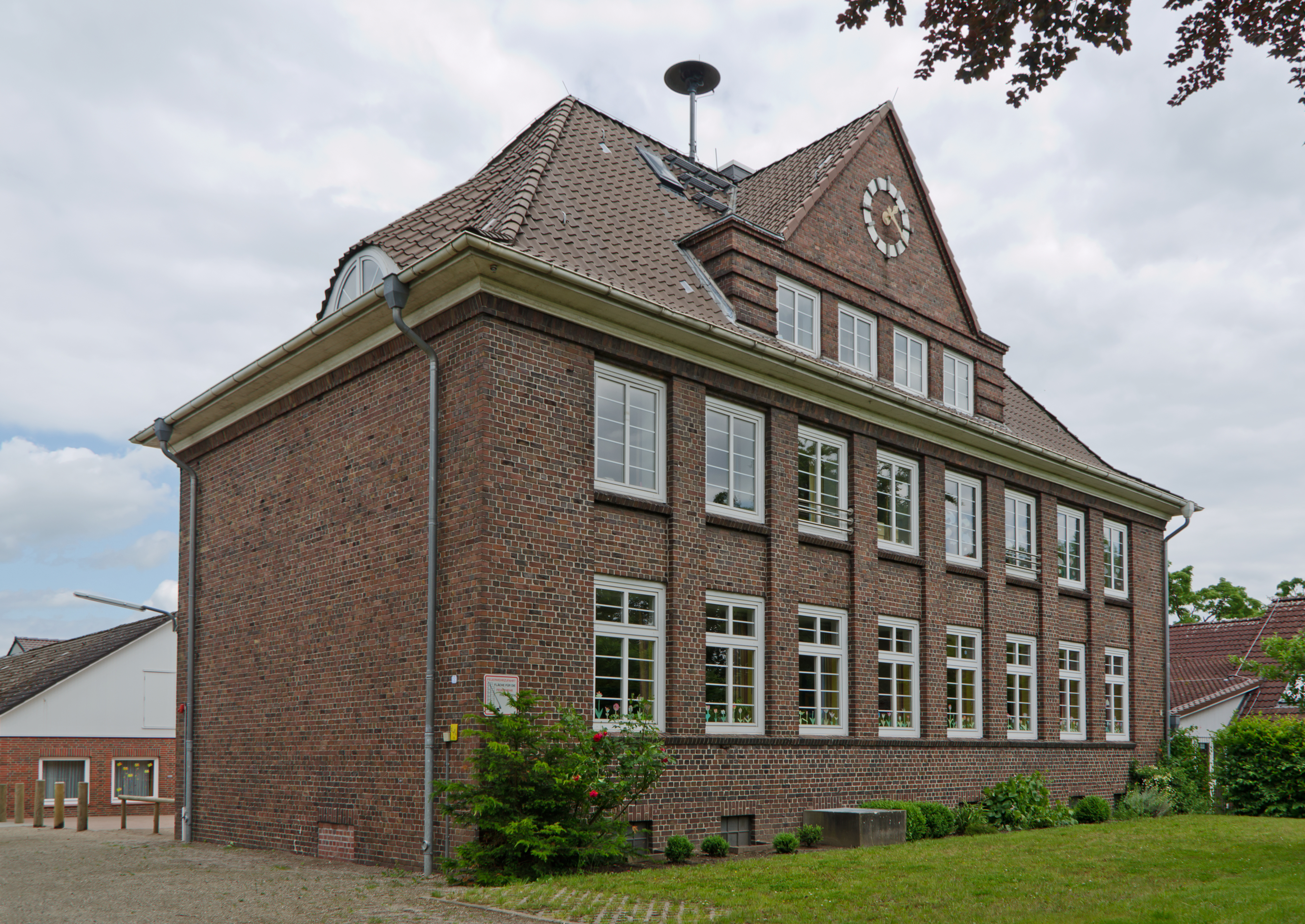 Borstel-Hohenraden Quickborner Str 99 (Schule)